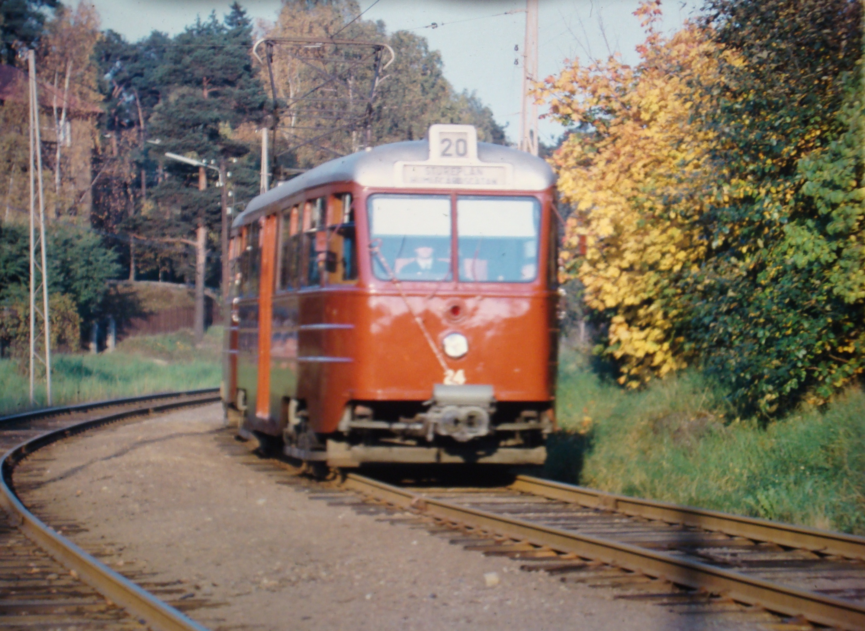 Norra Lidingöbanans tåg mellan Dalängen och Källbonäs